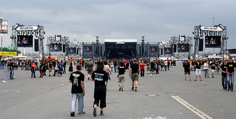 Lausitzring bei einem Konzert der Böhsen Onkelz